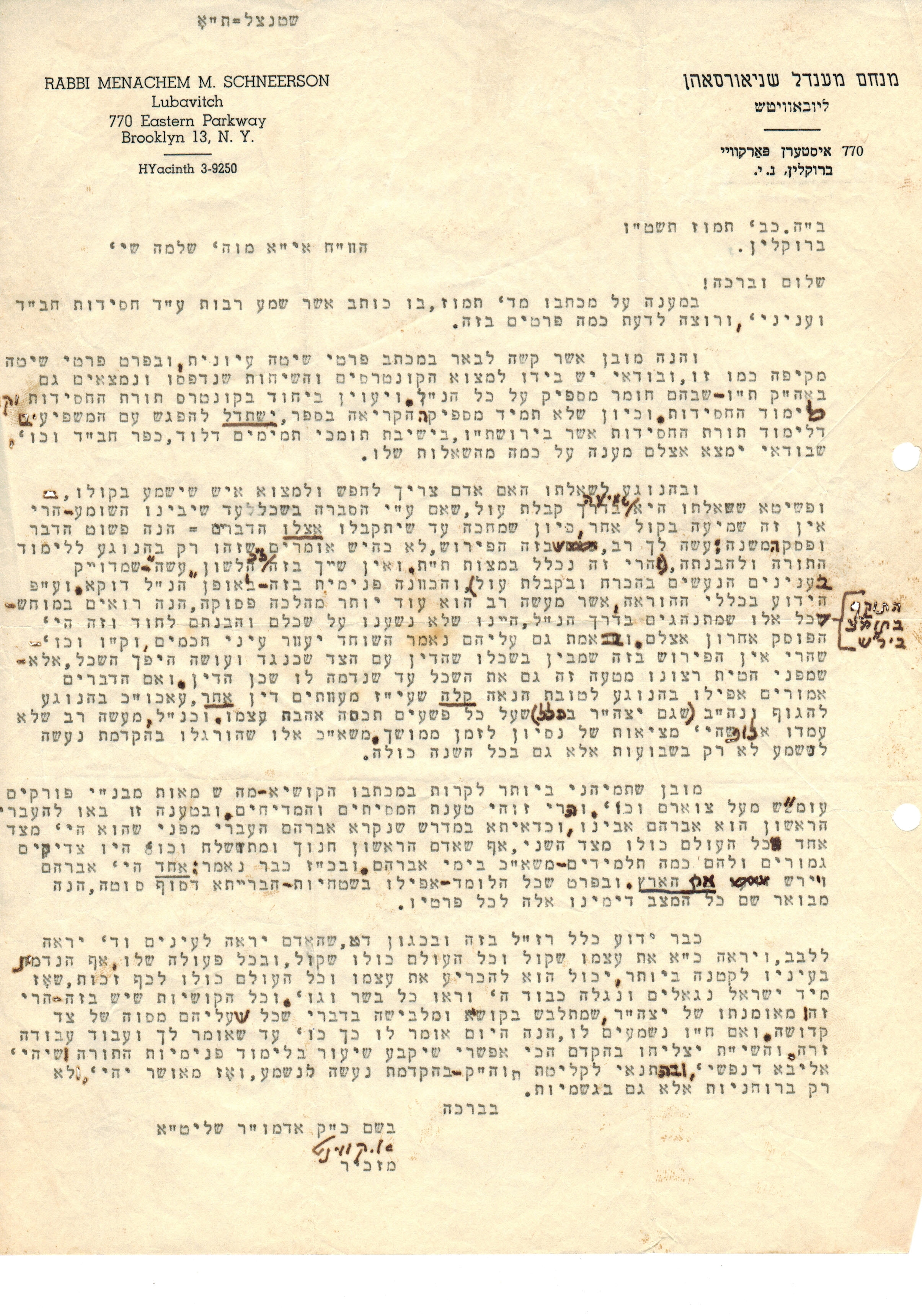 מכתב מעניין הרבי מליובאוויטש אל הרב שלמה שטנצל זצ"לה